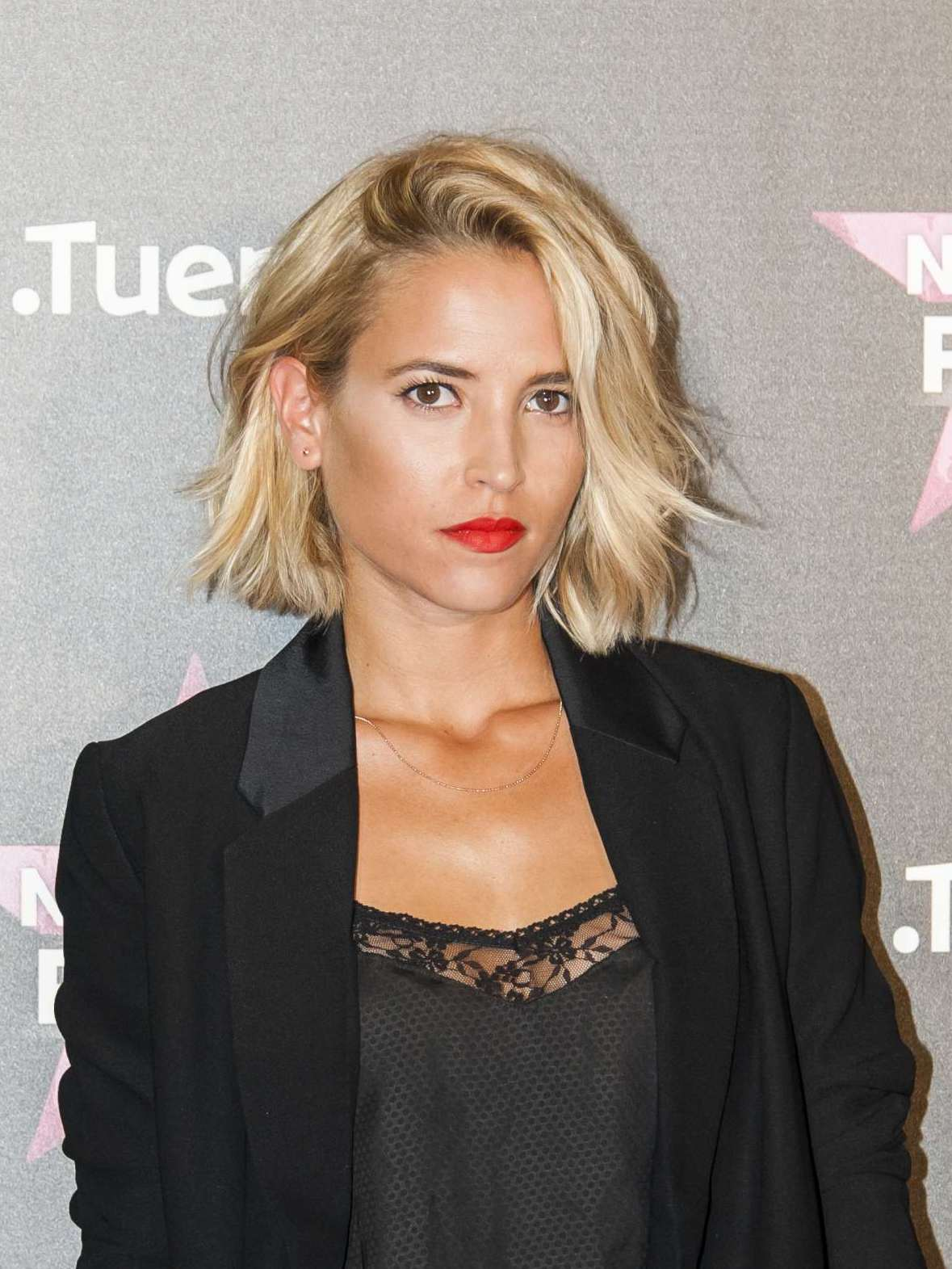 Fotos del photocall y fiesta de lanzamiento de un nuevo canal de televisión en España.